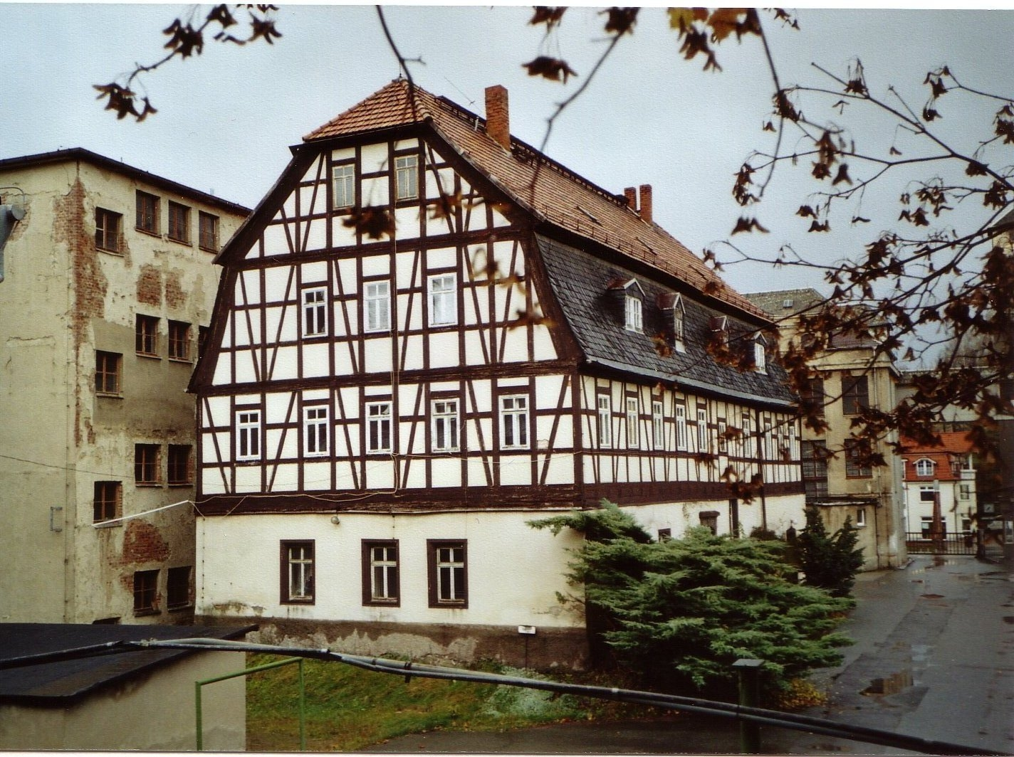 description: Fachwerkhaus in Oberlungwitz, errichtet von Johann Emanuel Samuel Uhlig, 1790 source: self made author: bein